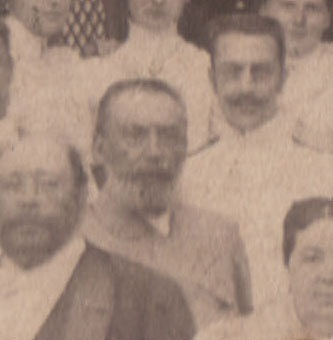 Среди гостей на даче Айвазовского в Шейх-Мамае, под Феодосией. Фото нач.-сер. 90-х гг. 19 в.